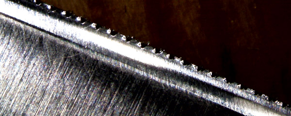 Küchenmesser, Edelstahlklinge nach dem Schärfen mit einem Schnellschärfer. (50*zoom)